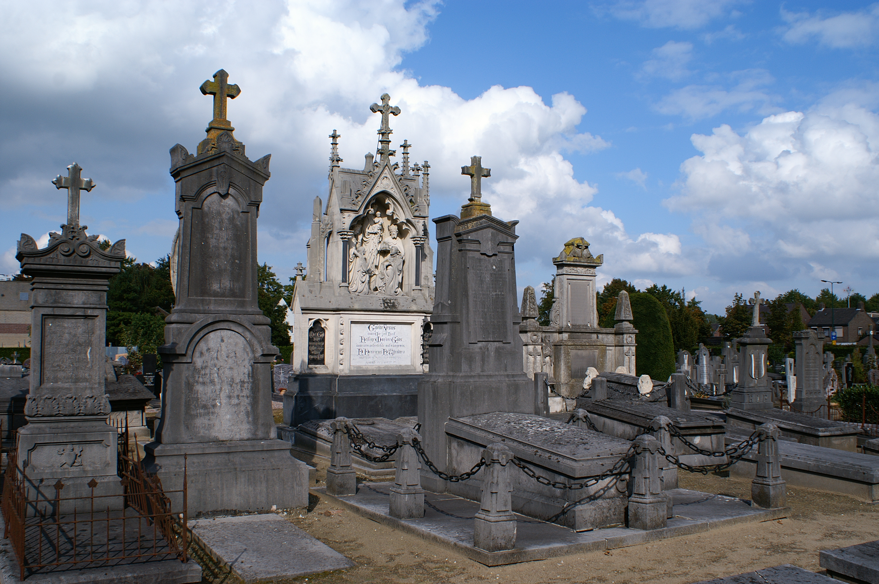 Uit 1880 daterend grafmonument in neo-classicistische stijl van A. (Antoon) Jurgens, 1805-1880, en van zijn vrouw J. (Johanna) Lemmens 1807-1879.